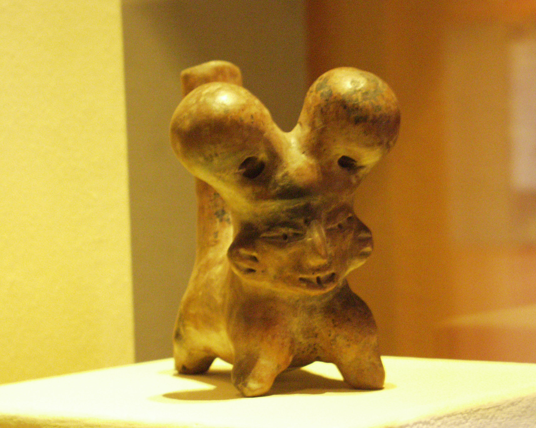 Amparo Museum in Puebla, Mexico.